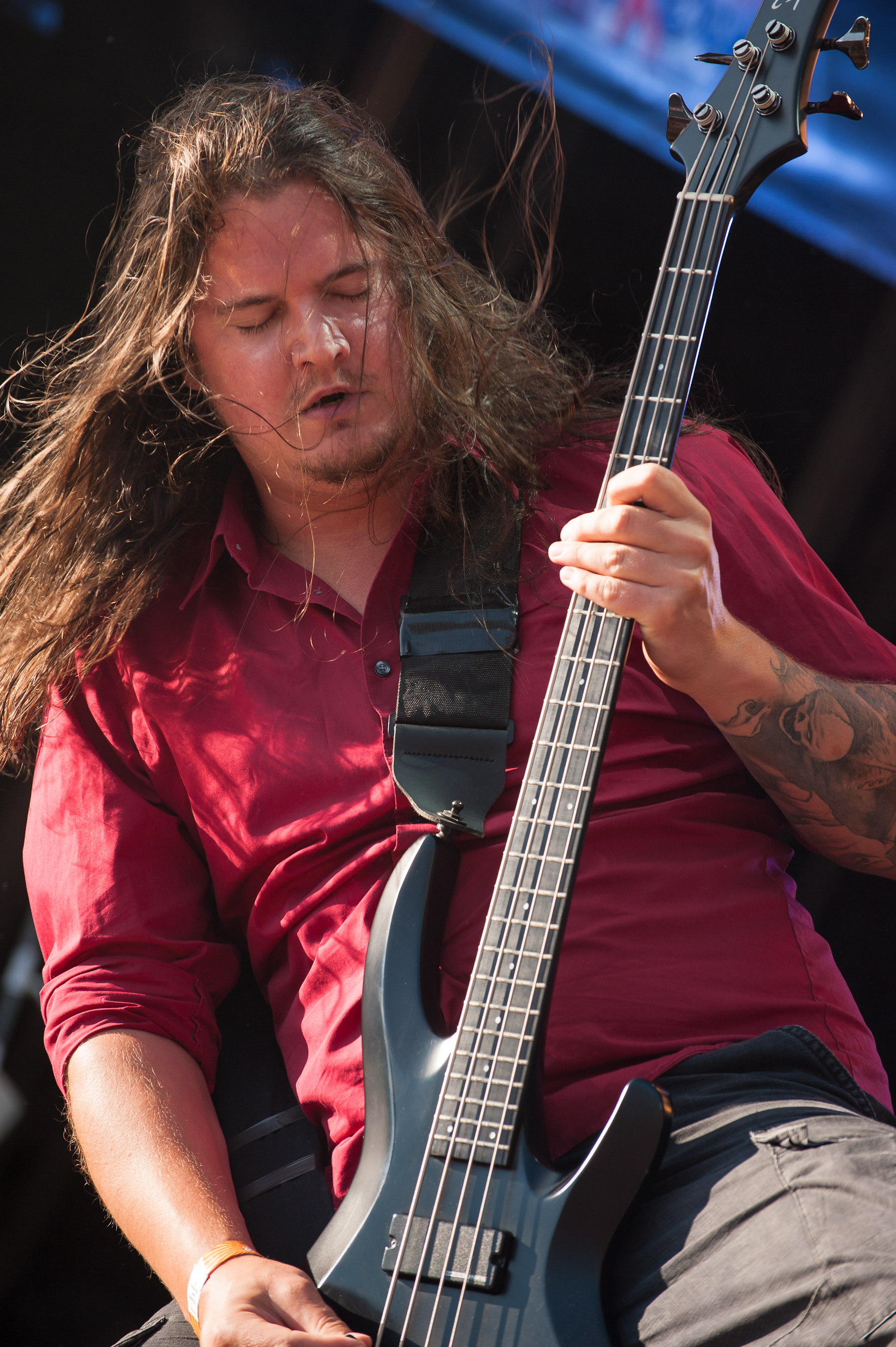 Heaven Shall Burn (deutsche Metalcore-Band) beim Rockfestival Rocco del Schlacko August, 2012. Am Bass, Eric Bischoff.